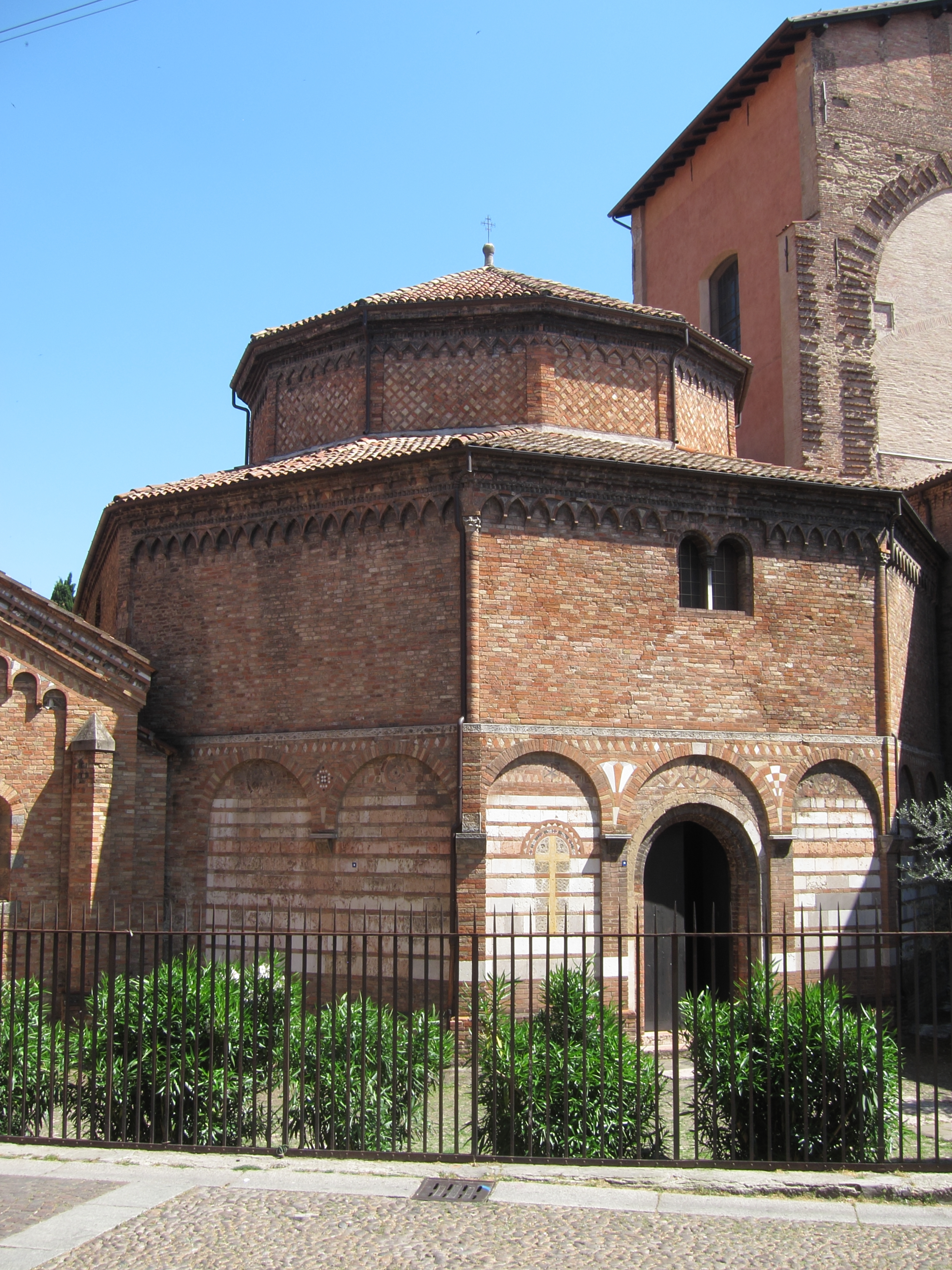 Santo Stefano (Bologna): Santo Sepolcro